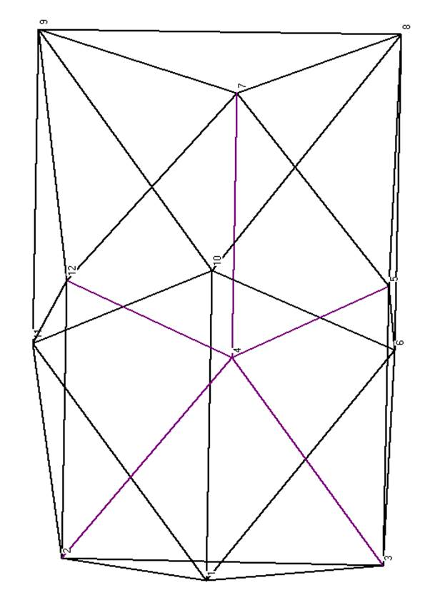 A lap-test élváza